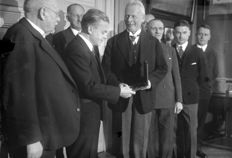 Feierliche Ueberreichung der Adlerplakette des Deutschen Reichsausschusses für Leibesübungen an den bekannten deutschen Segelflieger Günther Groenhoff ! Staatsminister a.D. Dominicus überreicht dem deutschen Segelflieger Günther Groenhoff feierlichst die Adler-Plakette.